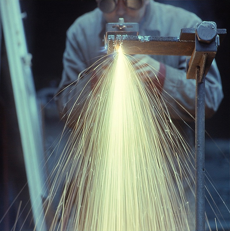 Original image description from the Deutsche Fotothek Schutzbrillenglas